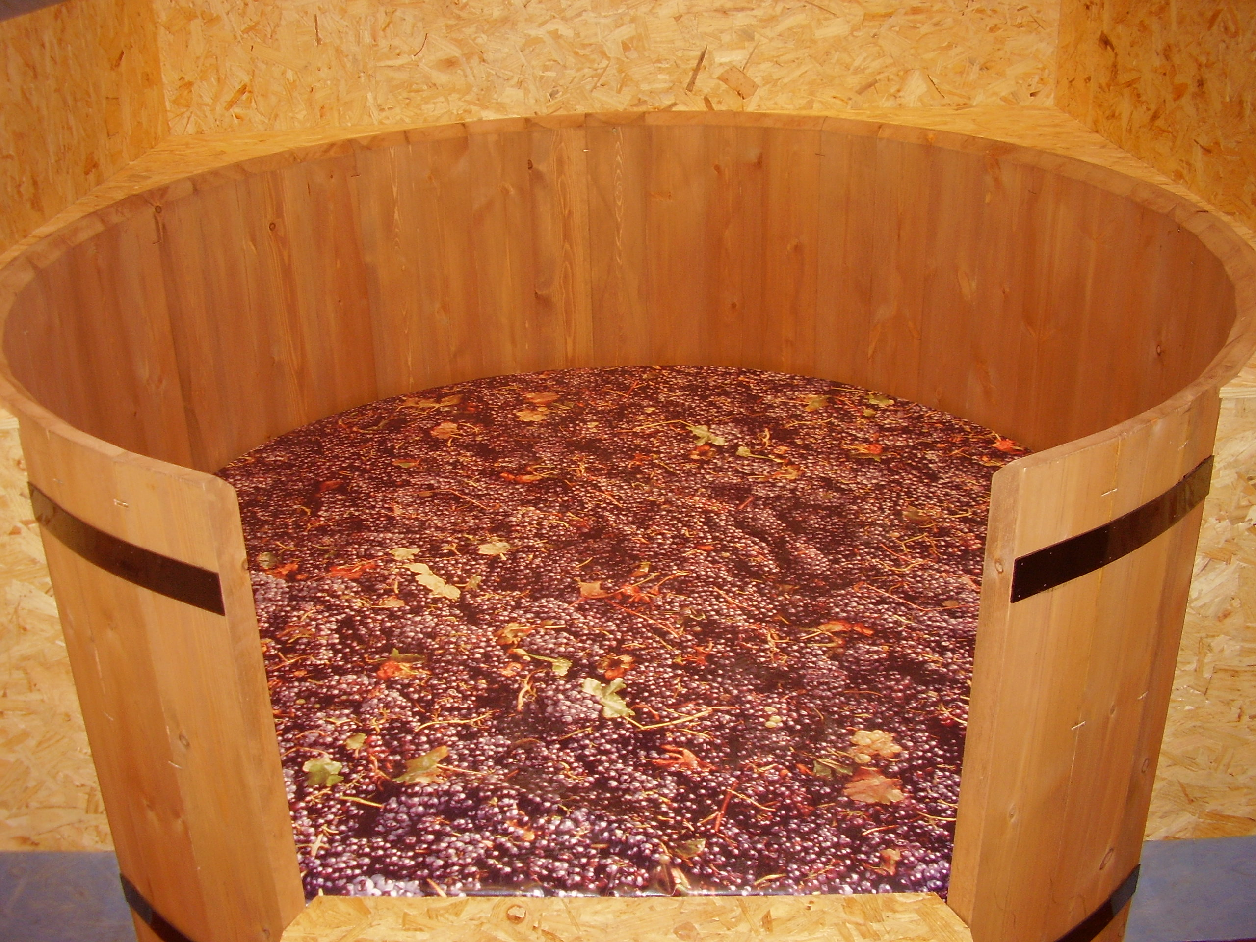 'Pasteur, el detective del vino', sala permanente dedicada a la ciencia del vino del Museo de la Ciencia de Valladolid. Comisario: Óscar Menéndez. Producción: Explora Proyectos. Dirección Artística: Chácena. Louis Pasteur exhibit at the Valladolid Science Museum.